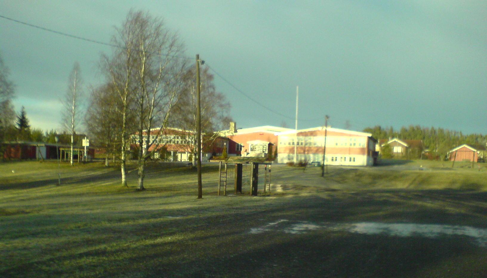 Haneborg skole på Lierfoss i Aurskog-Høland kommune.